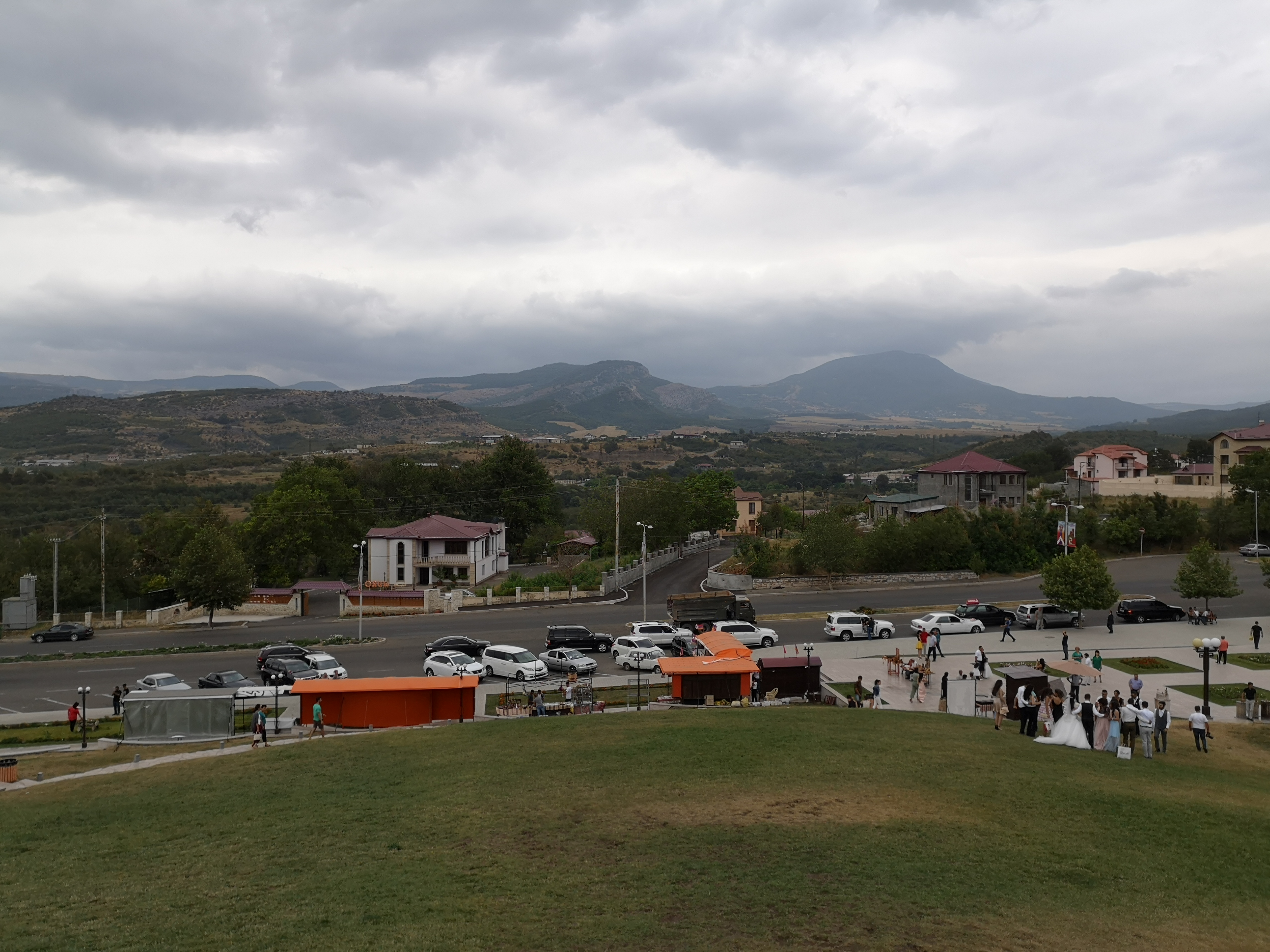 Dieses Bild habe ich von dem Standpunkt Tatik Papik aufgenommen